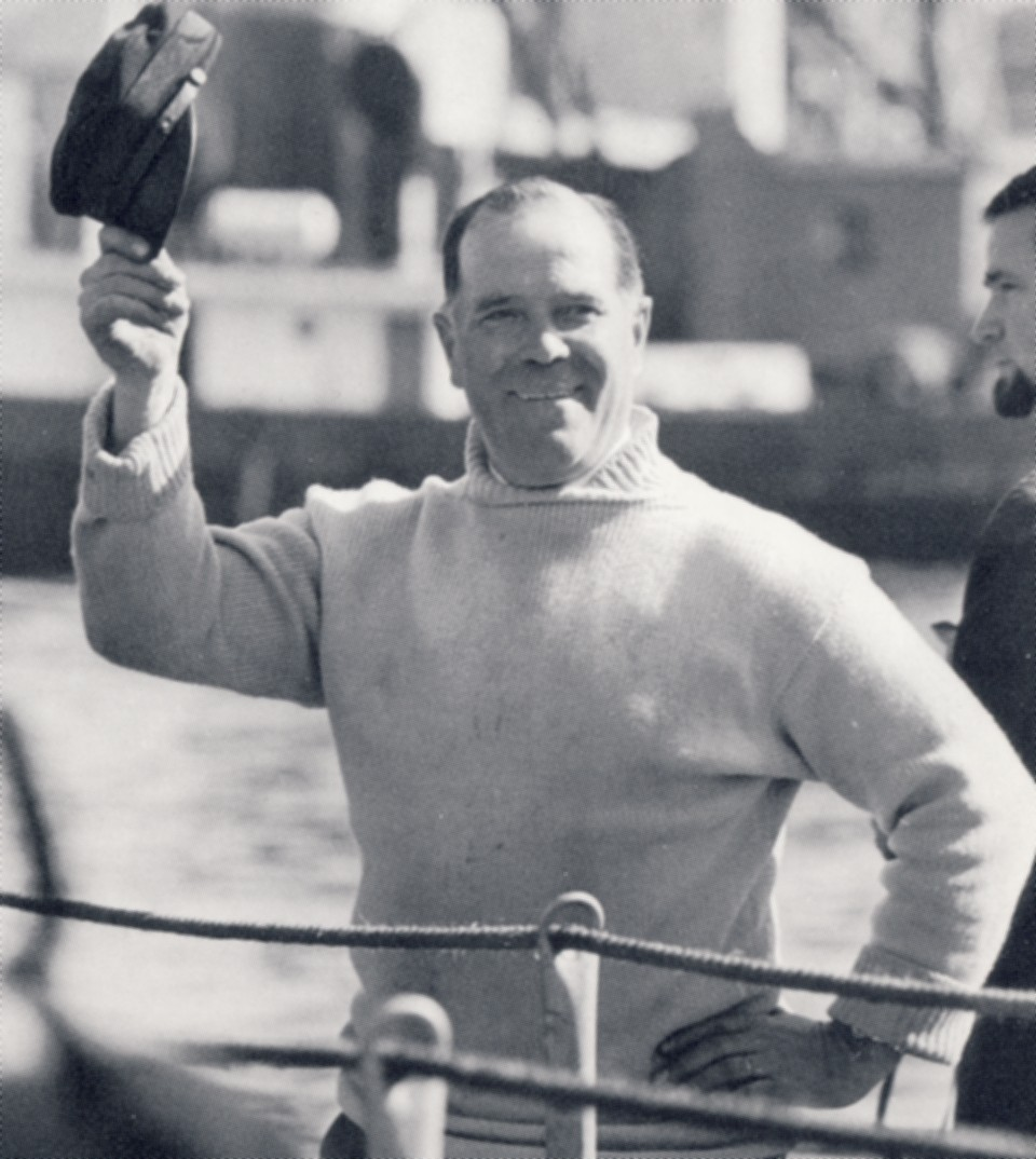 Dykarbasen Per Edvin Fälting vid bärgningen av regelskeppet Vasa 1961